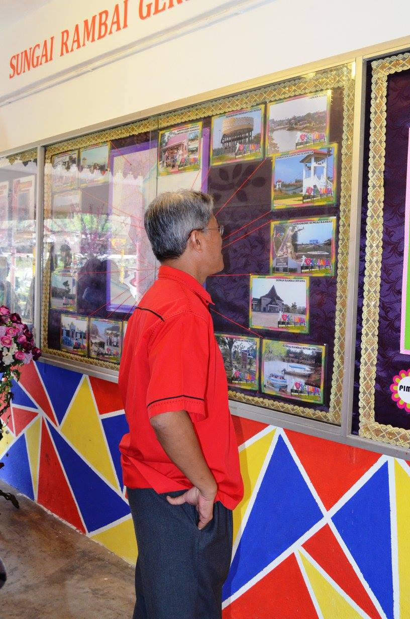 Yb suka gamba